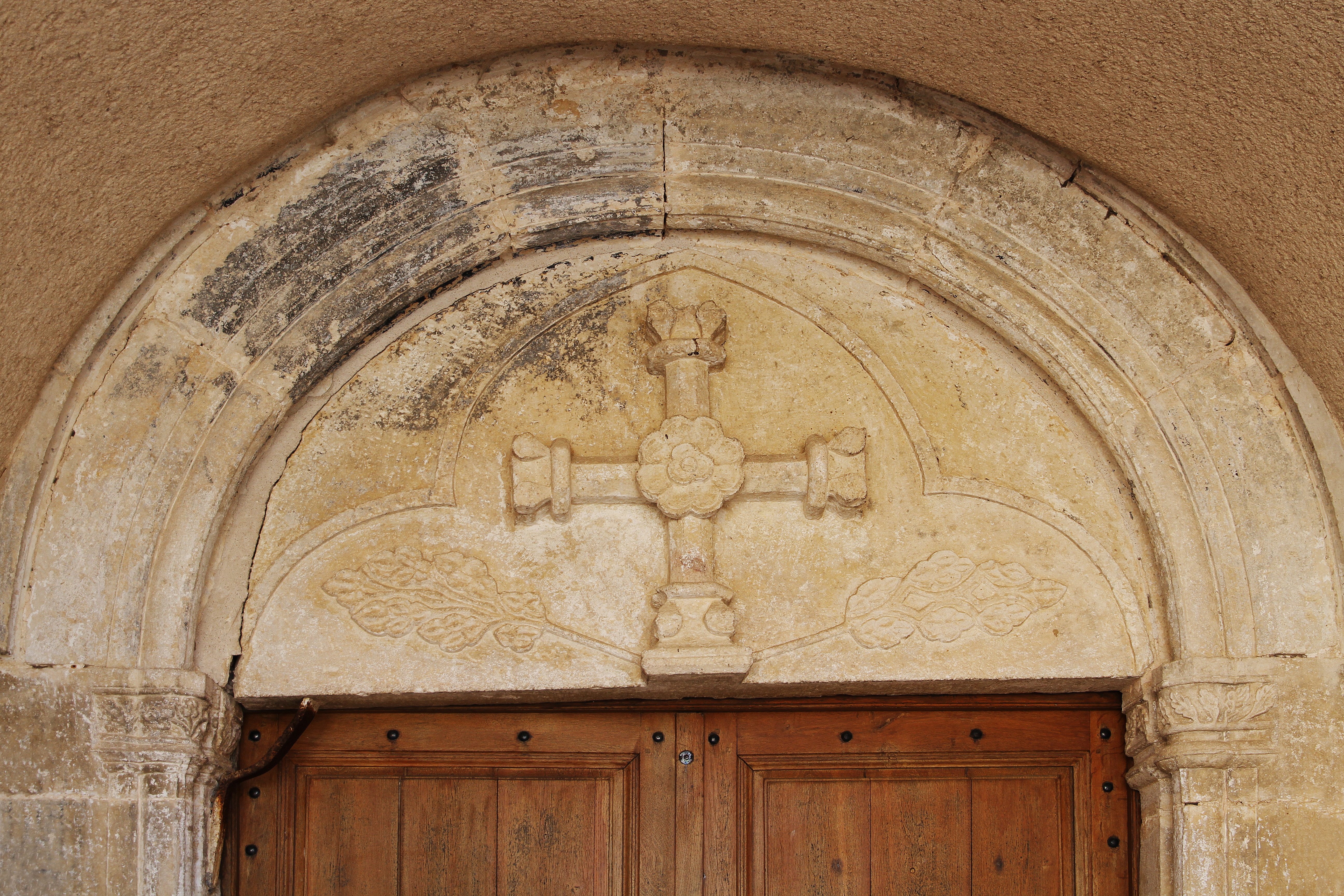 Tympan XIVème de l'église Saint-Frodulphe de Barjon